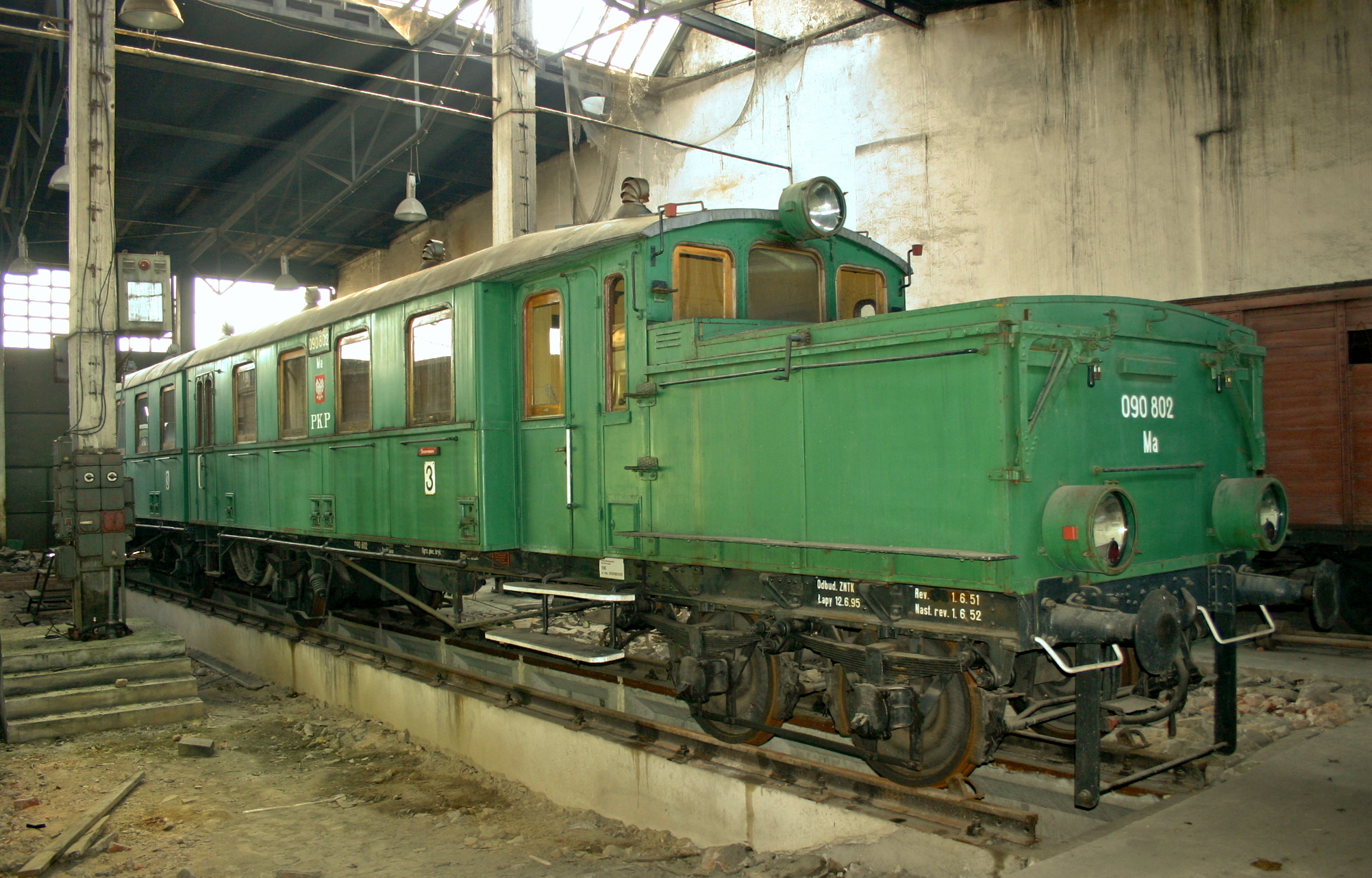 Akkumulator-Triebwagen 090 802 Ma (ex DRG AT 543/544) in Skierniewice 5.April 2005